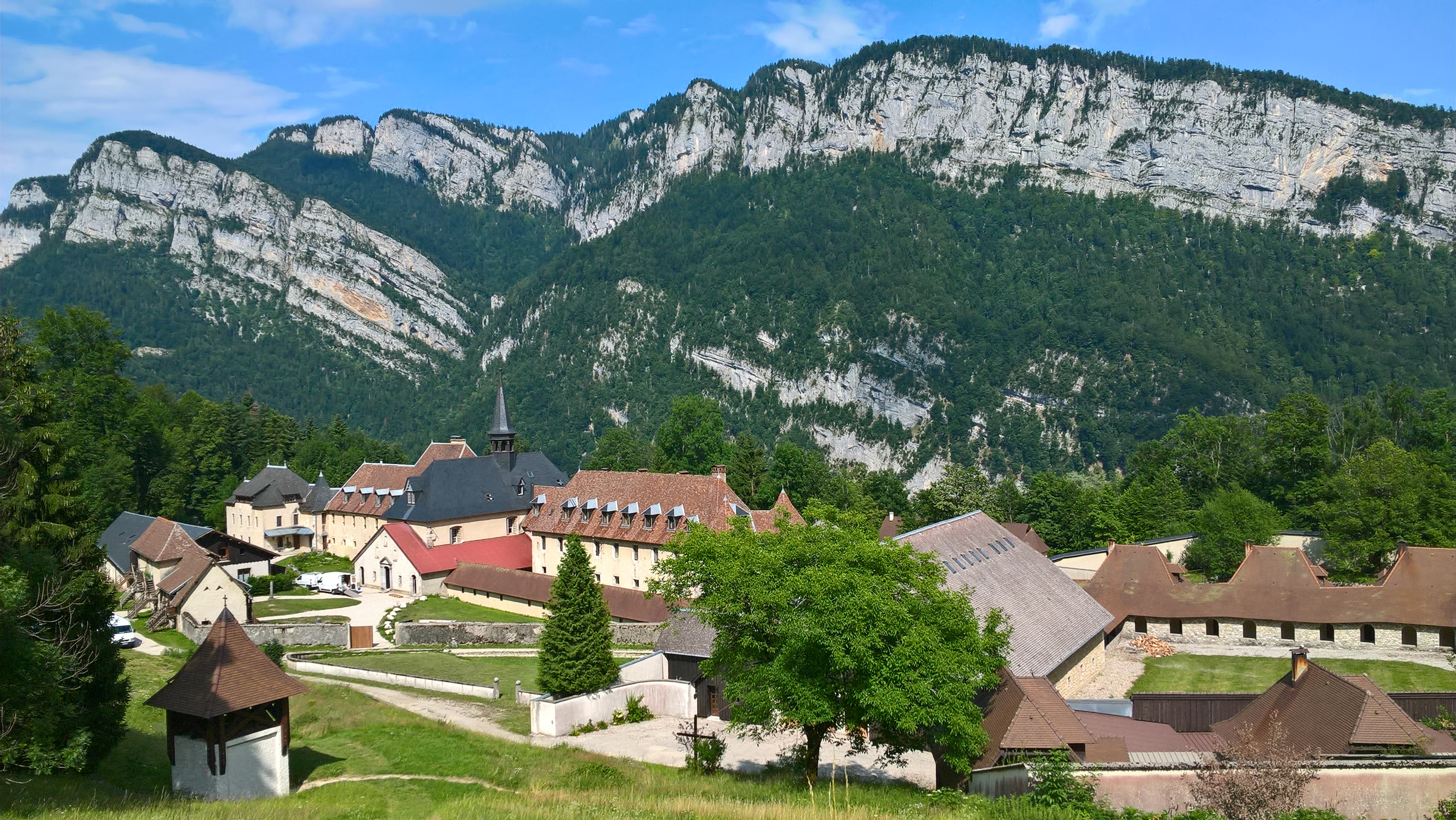 Saint-Laurent-du-Pont, Chartreuse de Currières .